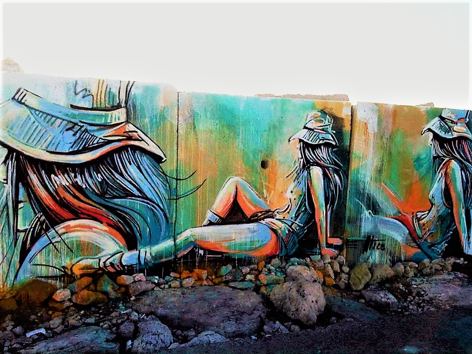 Molo Sud Murales